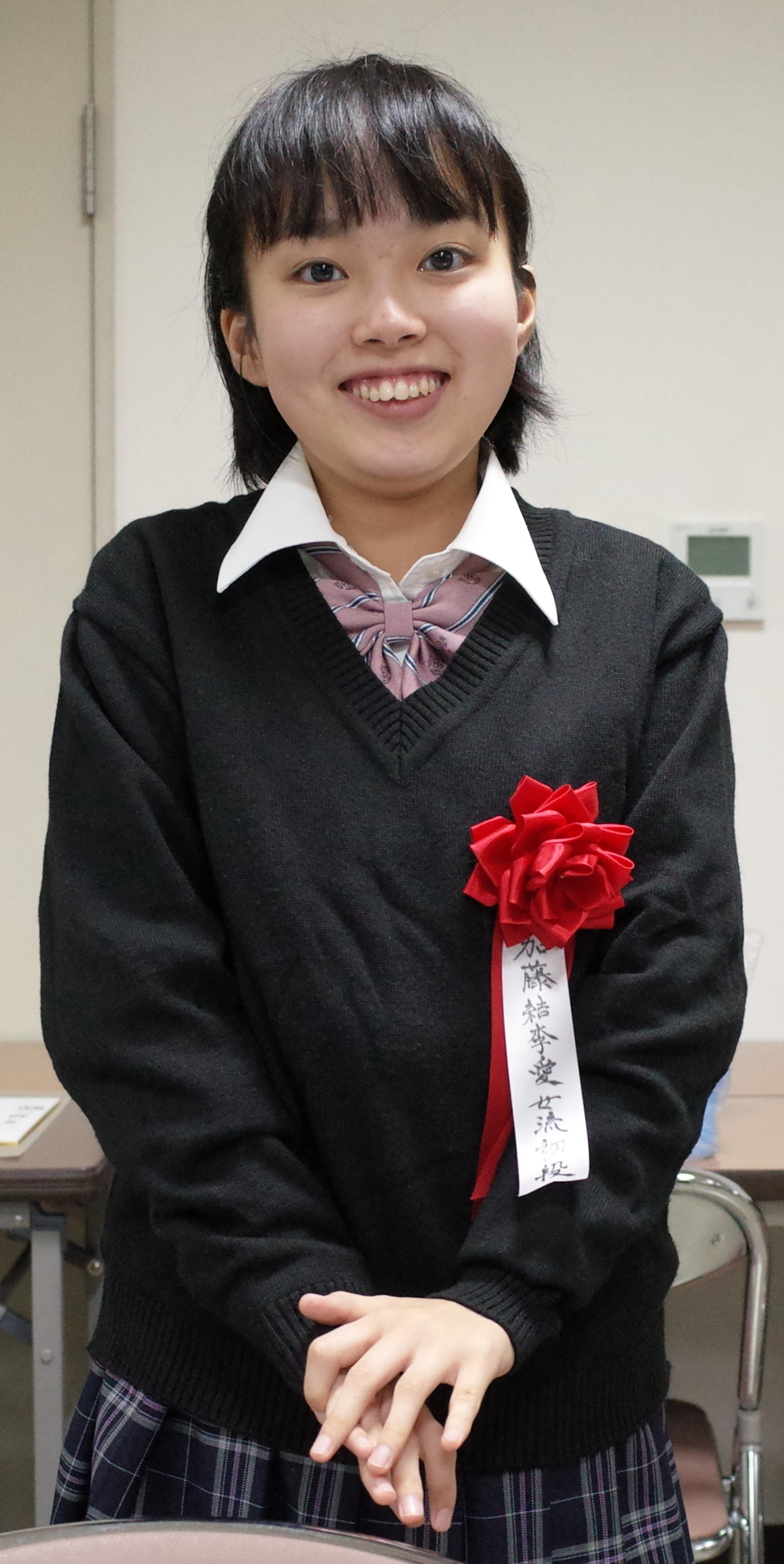 加藤結李愛女流初段。2019年10月29日、棋士会みやぎ将棋フェスティバルにて。